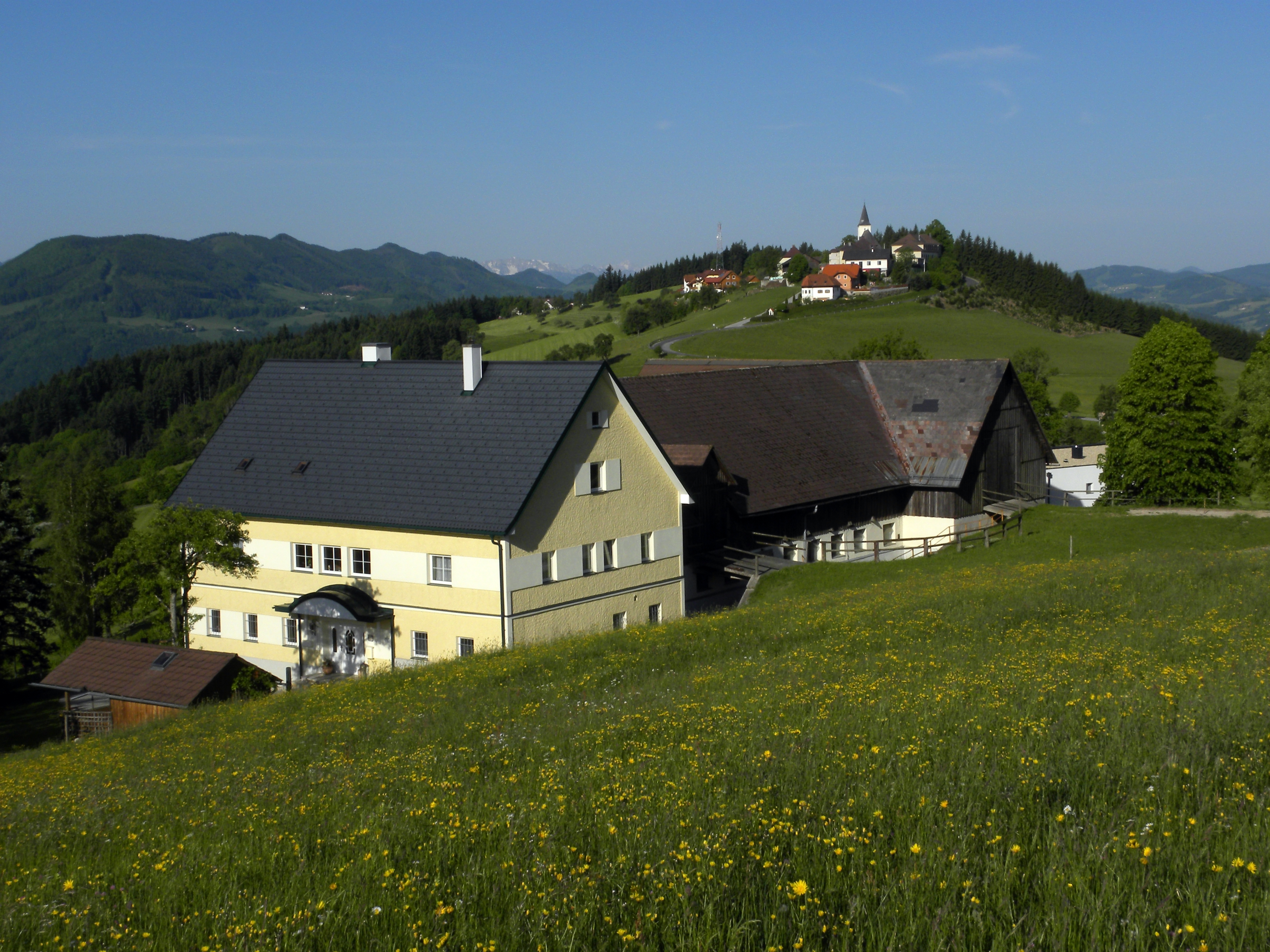 Der Bauernhof Sandhof in Windhag war von 1939 bis 1943 ein sog. "Umschulungslager" der Wiener Zentralstelle für jüdische Auswanderung - siehe dazu doew.at. Heute ist der Sandhof ein Bio-Bauernhof.